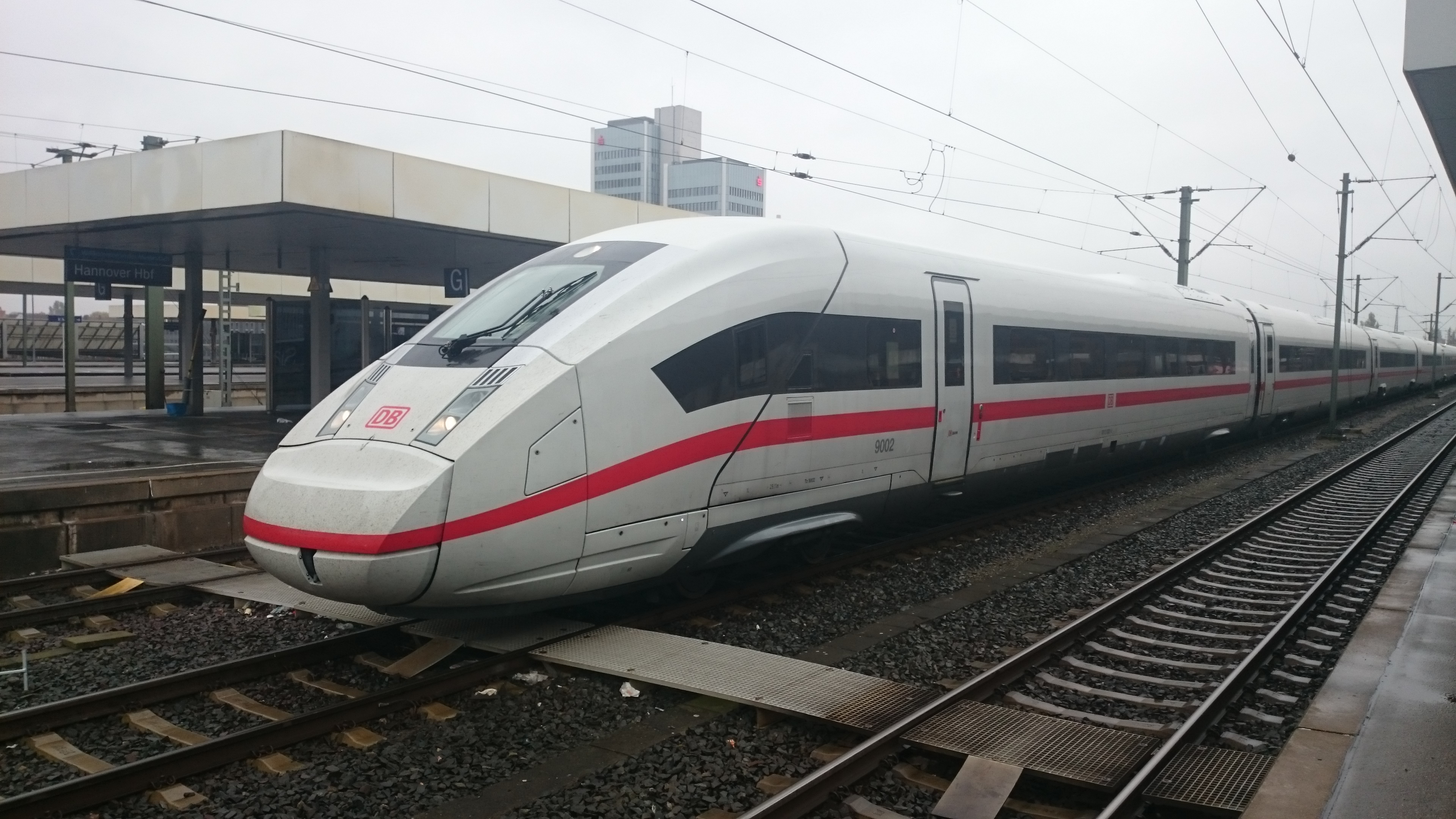 Frontpartie eines ICE4 12teilig mit der Nummer 9002